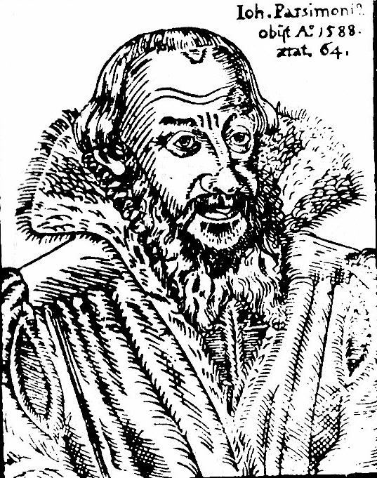 Johannes Jacob Parsimonius/Johannes Karg (1525-1588)